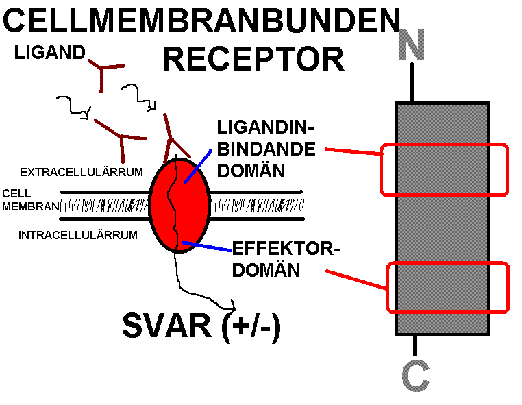 mekanismer för mebranbunden receptor